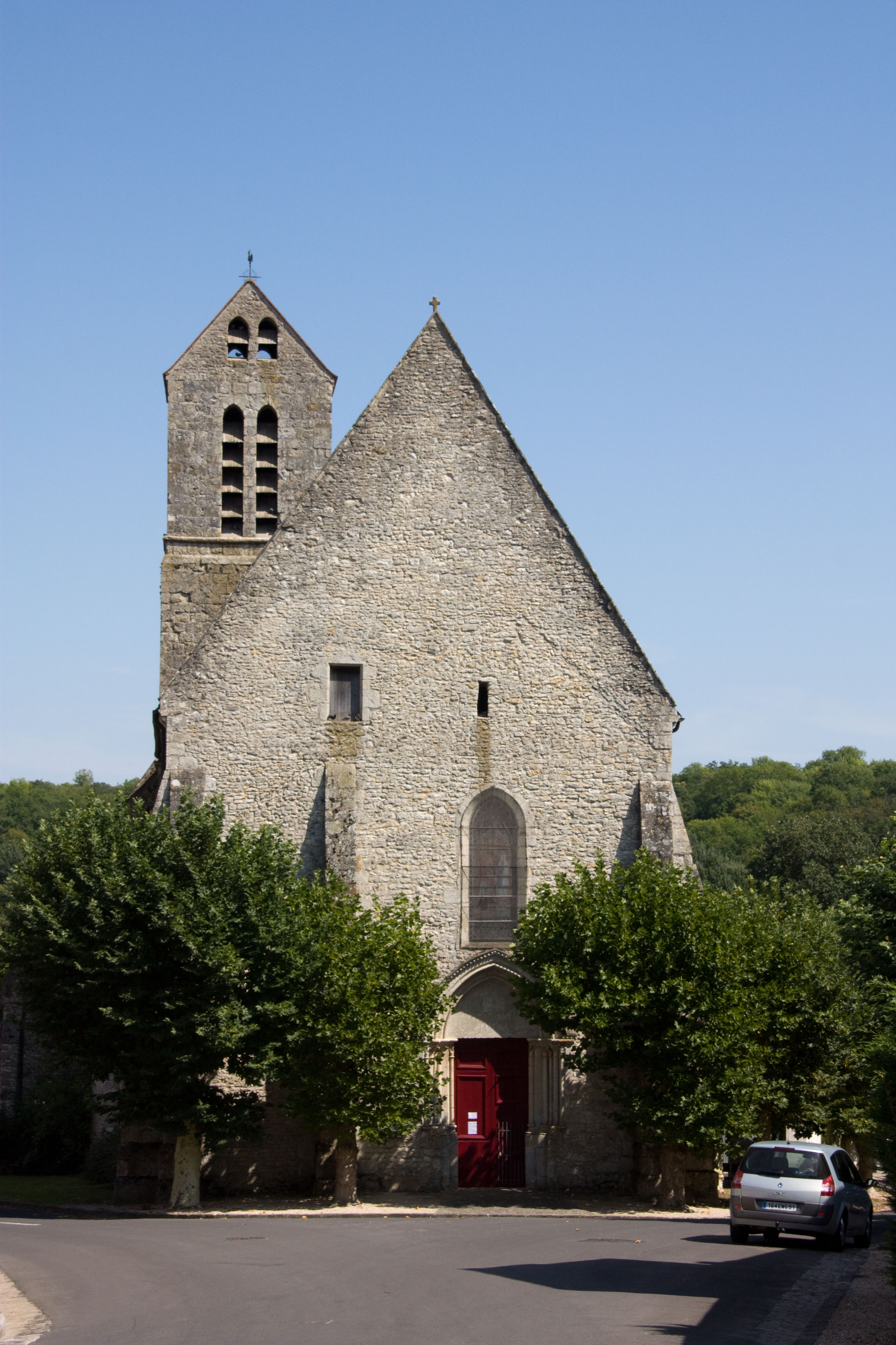 Eglise de Boigneville, Boigneville, Essonne, France